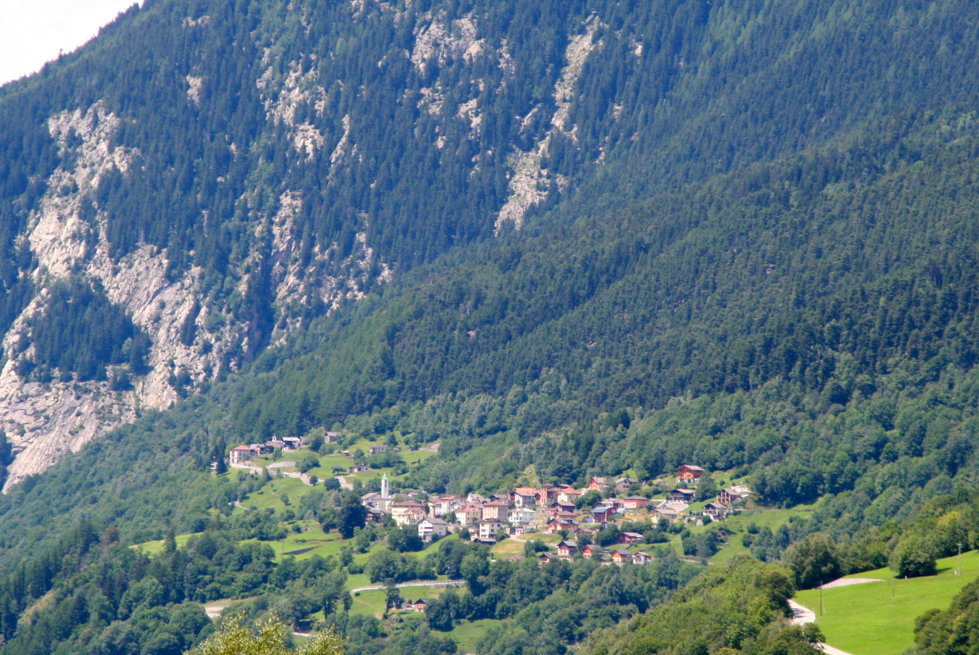 Osco